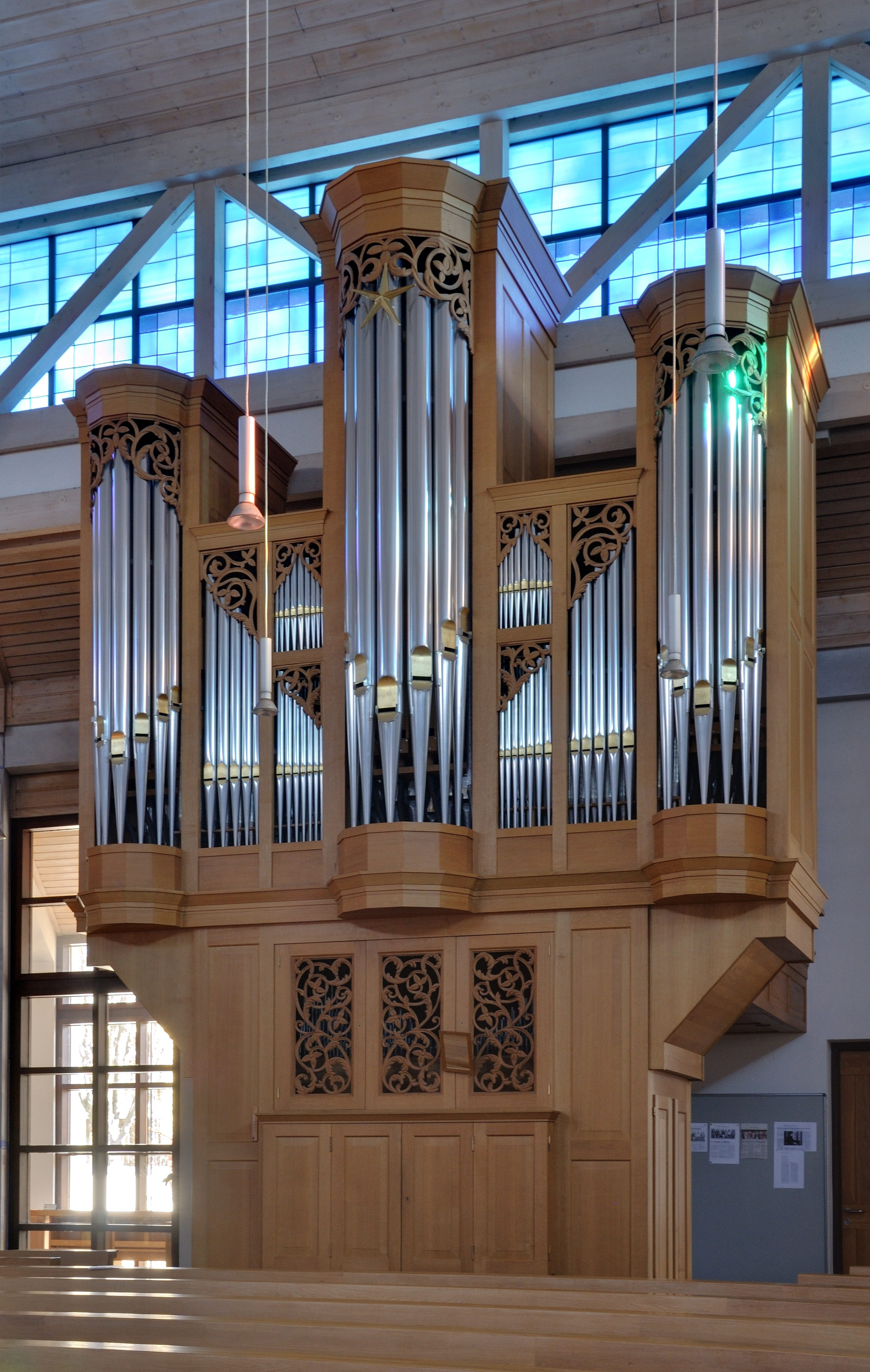 Weil am Rhein: Peter-und-Paul-Kirche (Orgel)